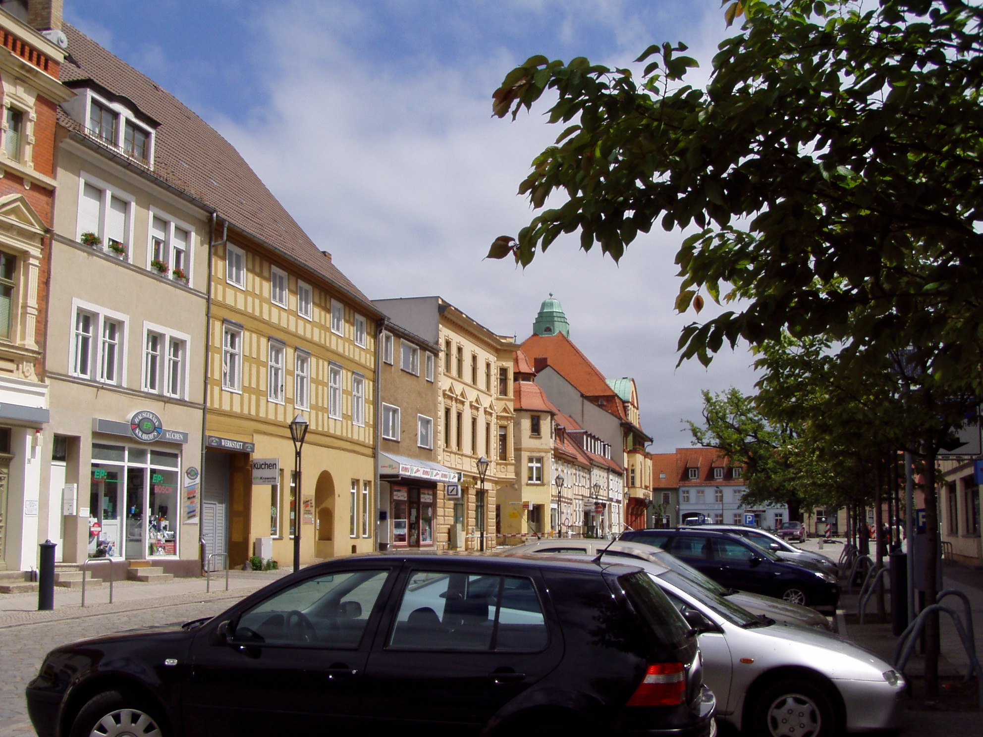 Der Marktplatz in Kyritz. - The market square in Kyritz (Germany)